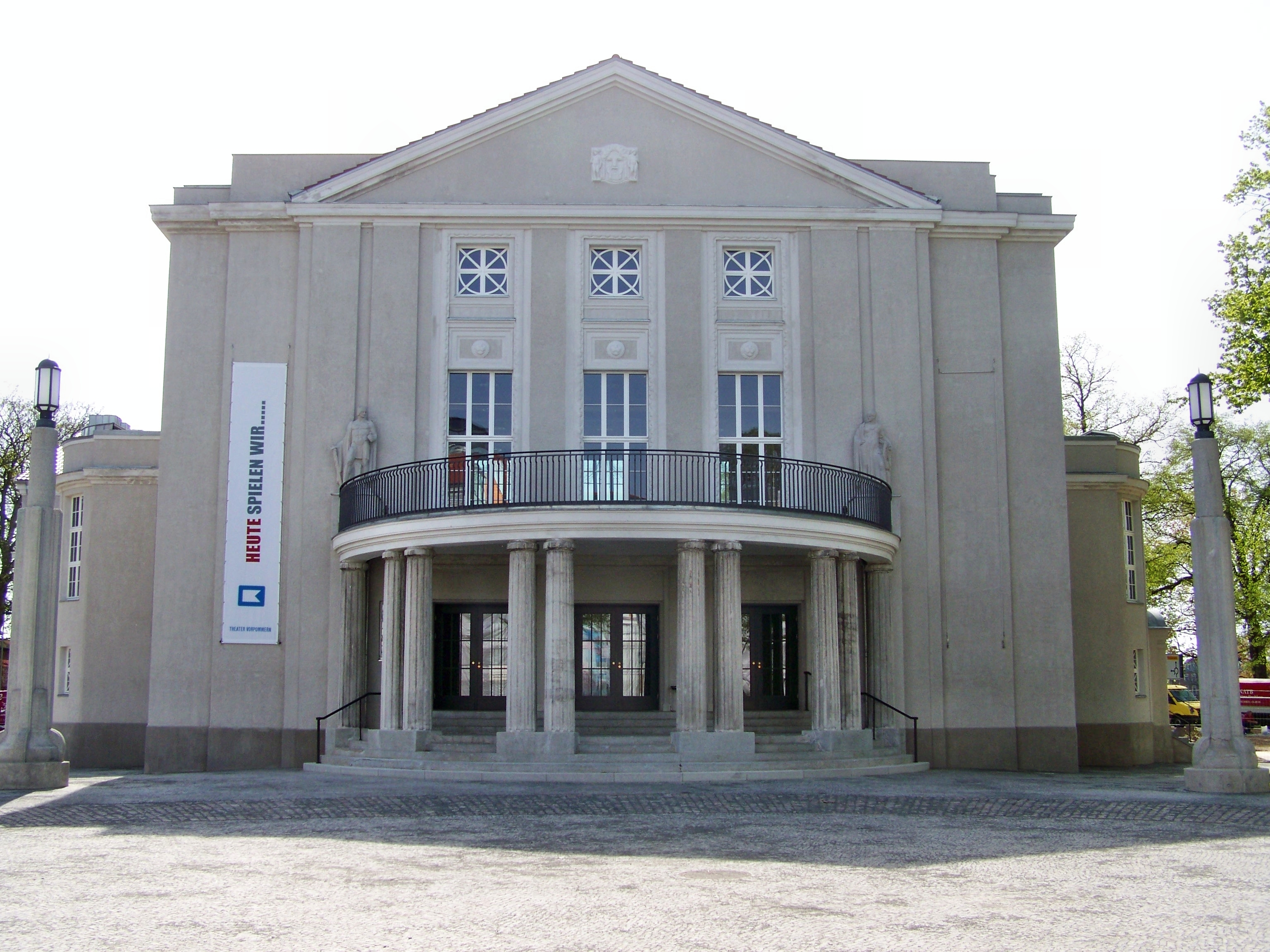 Stralsund. Theater nach der Sanierung